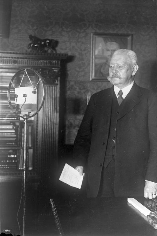 Reichspräsident von Hindenburg hält vor dem Rundfunk seine grosse Neujahrsrede an das deutsche Volk! Die Rede wurde über alle Sender der Welt verbreitet. Reichspräsident von Hindenburg vor dem Mikrophon im Arbeitszimmer seines Palais.